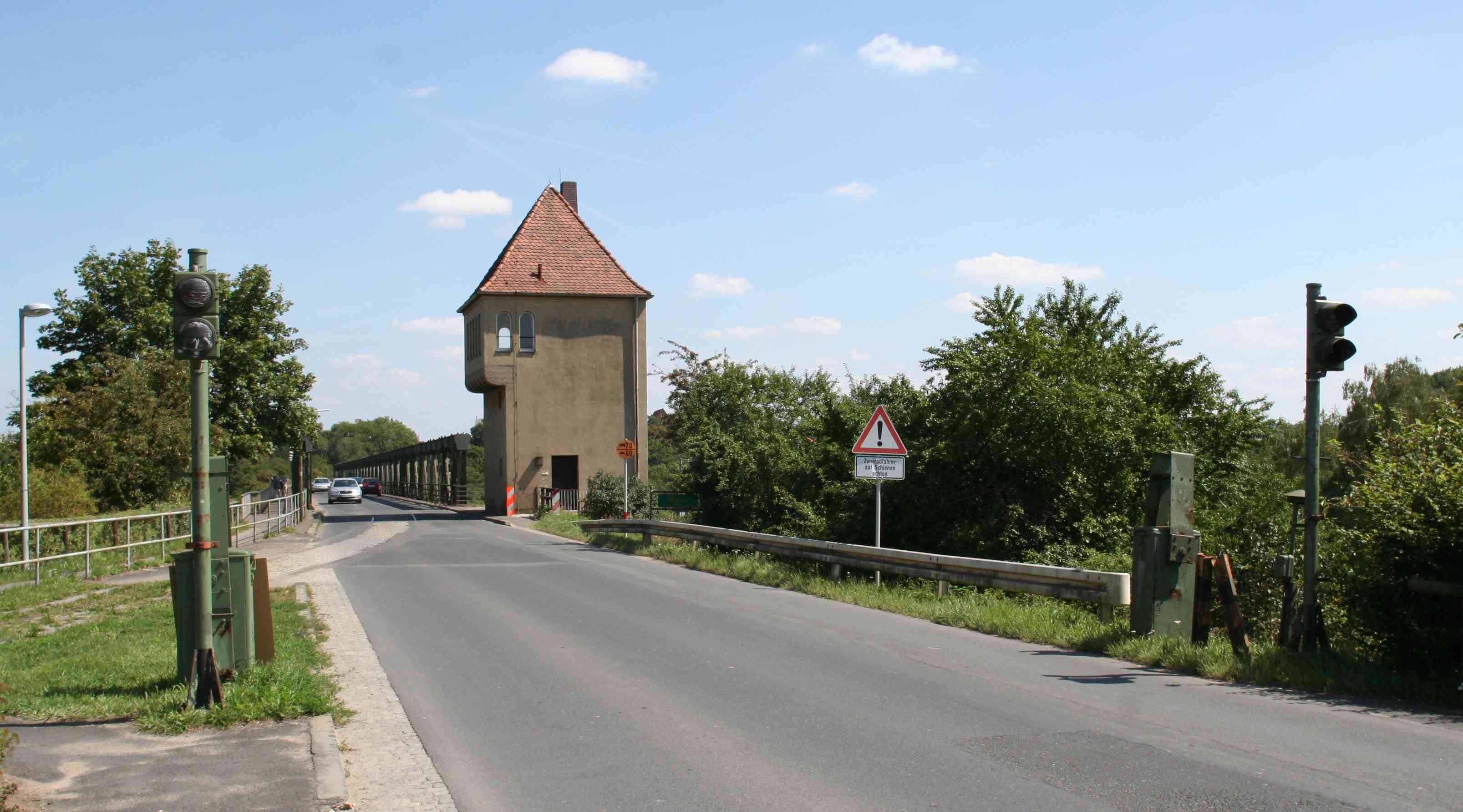 Mainbrücke Volkach, Landkreis Kitzingen, Unterfranken